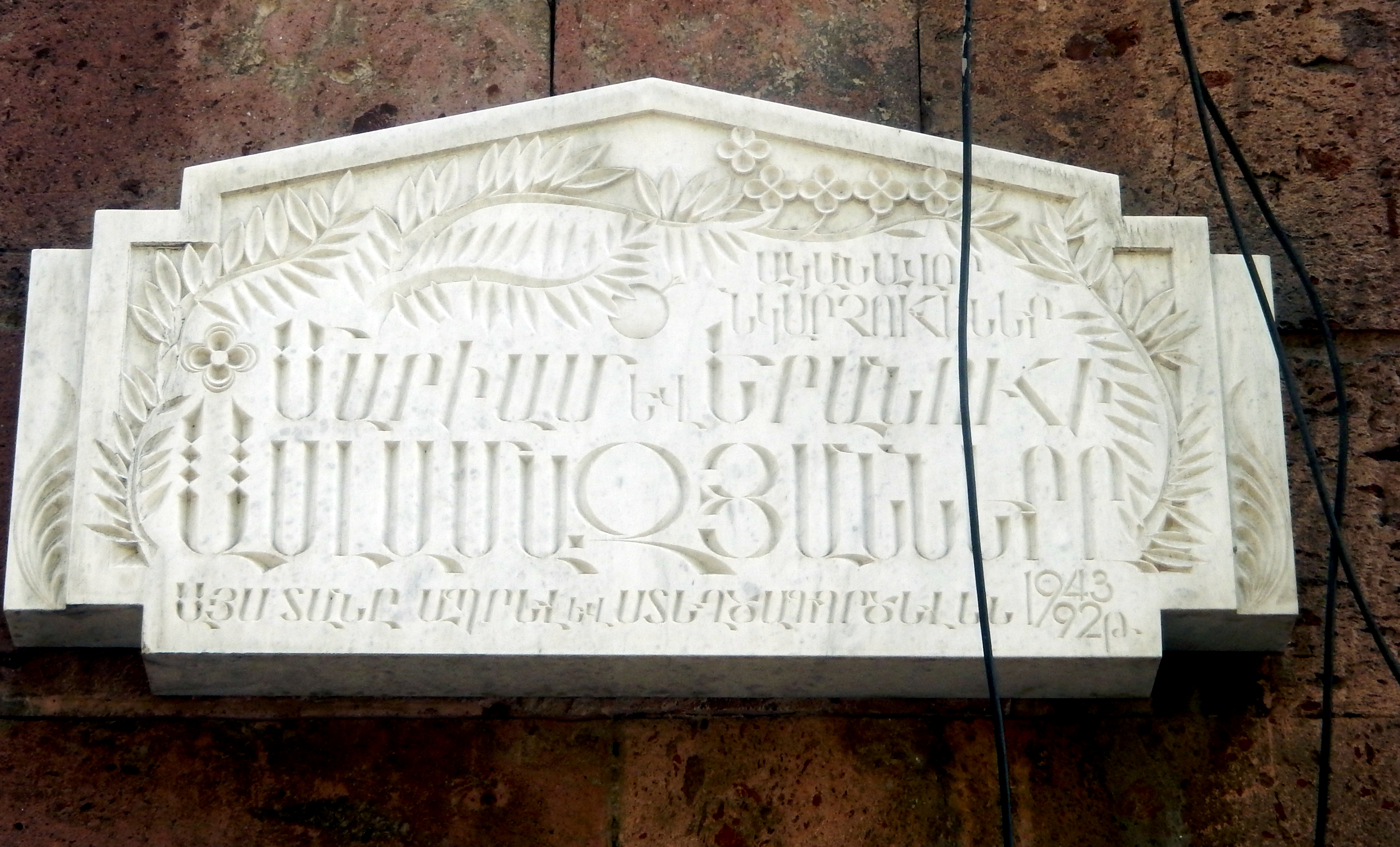 Plaque for Mariam & Yeranuhi Aslamazyan